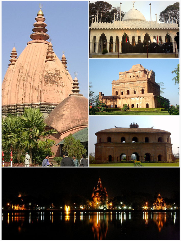 অসমীয়া: (ওপৰৰ পৰা ঘড়ীৰ কাঁটাৰ দিশত) শিৱসাগৰৰ শিৱদৌল, শৰাগুৰি চাপৰিৰ আজানপীৰৰ দৰগাহ, গড়গাঁওৰ কাৰেংঘৰ, ৰংঘৰ, আৰু নিশাৰ শিৱসাগৰ পুখুৰী